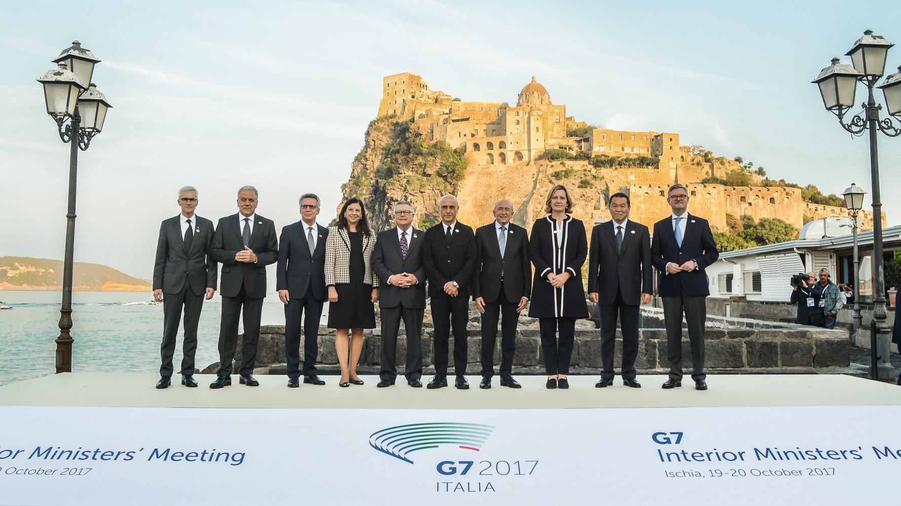 Foto dei partecipanti al G7 Interno di Ischia